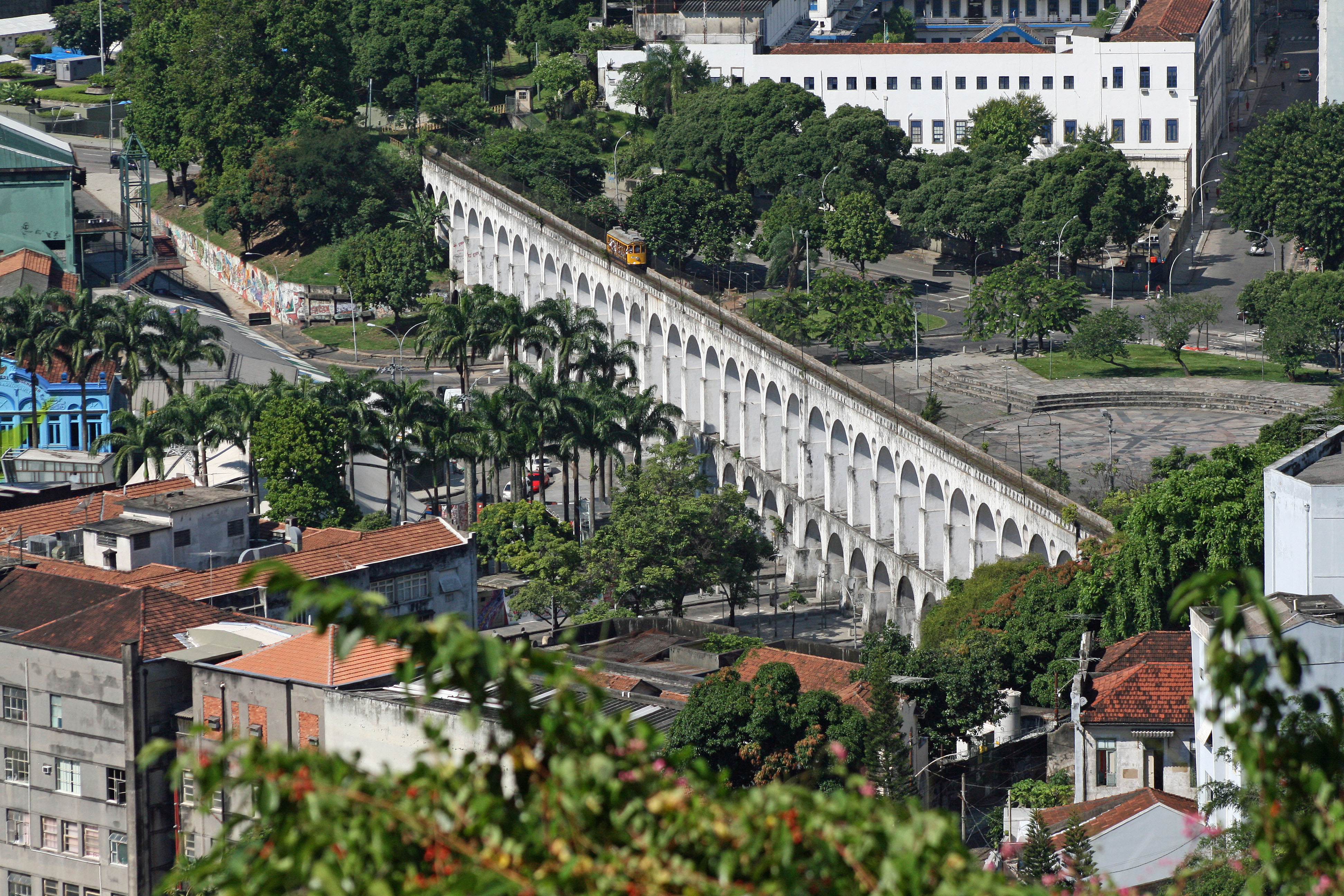 Arcos da Lapa visto de Santa Teresa. Fotografia tirada do Museu da Chácara do Céu com teleobjetiva.